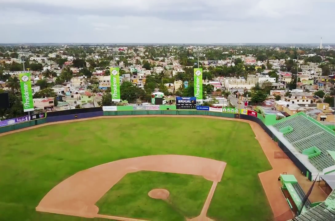 Estadio Tetelo Vargas